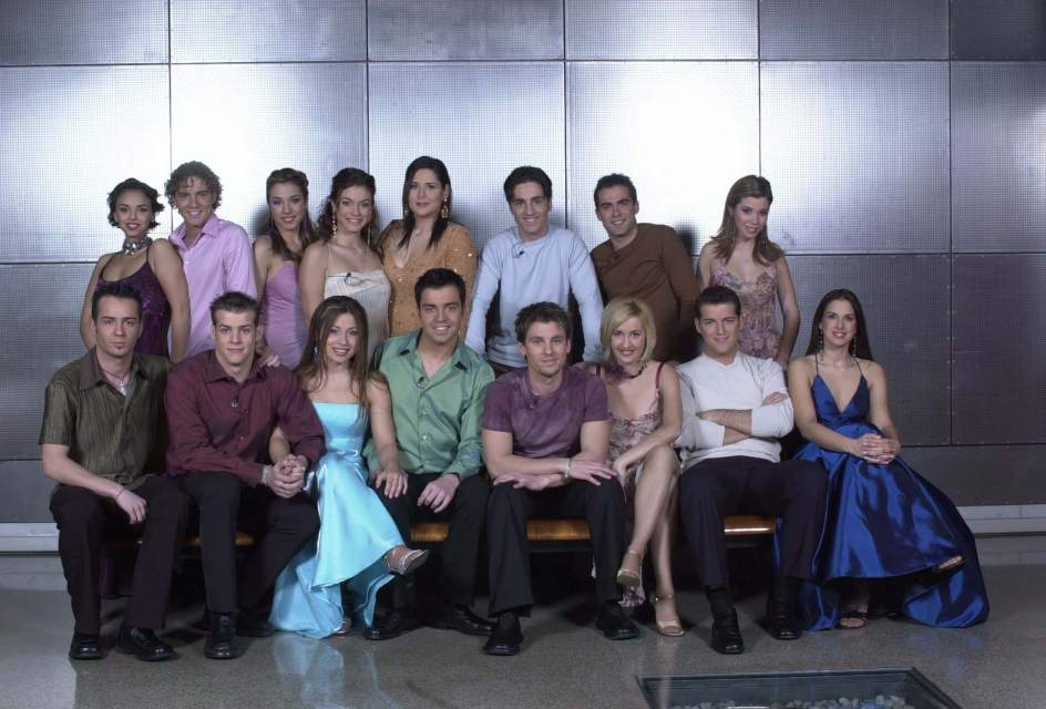 Concursantes de OT 2001